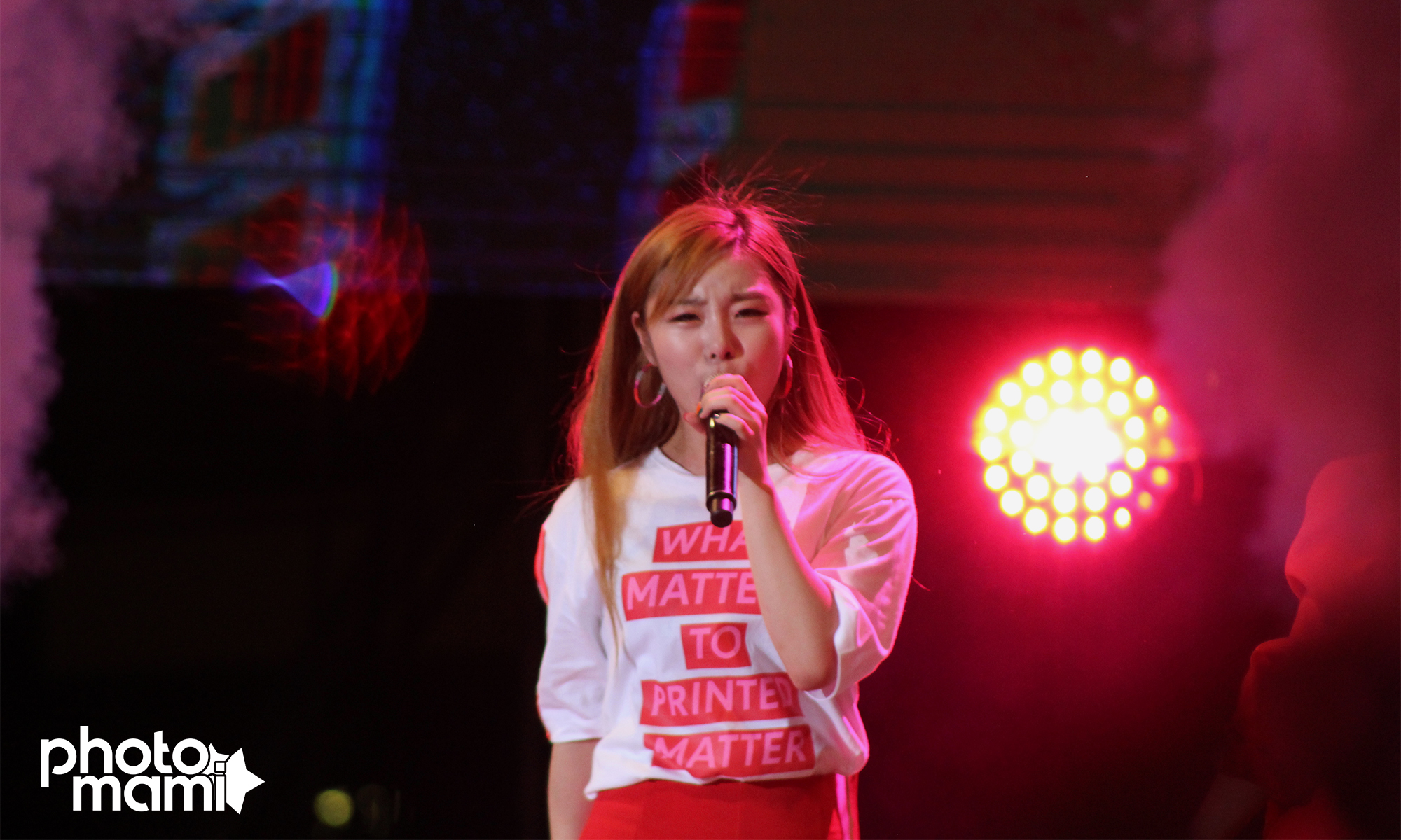 170719 대구치맥페스티벌